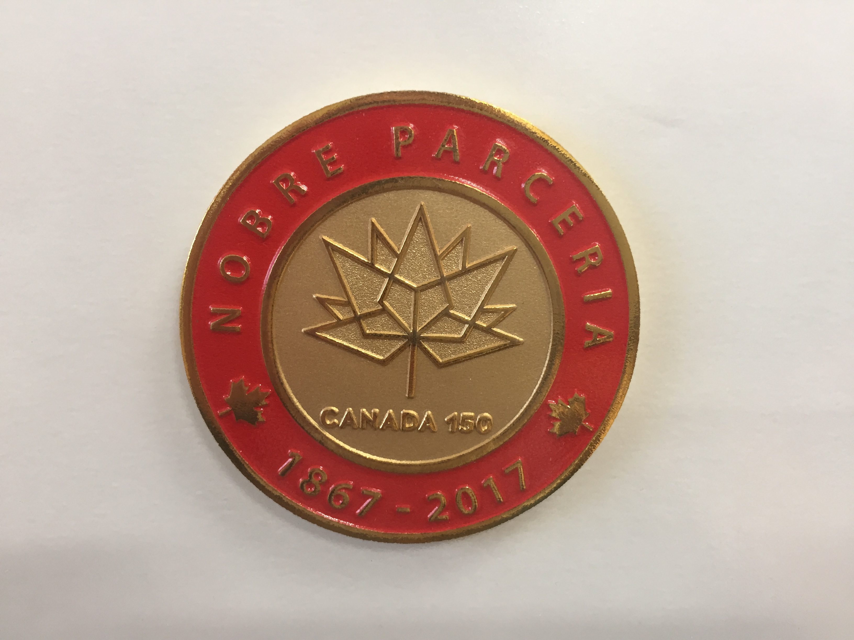 Premiação governo canadense